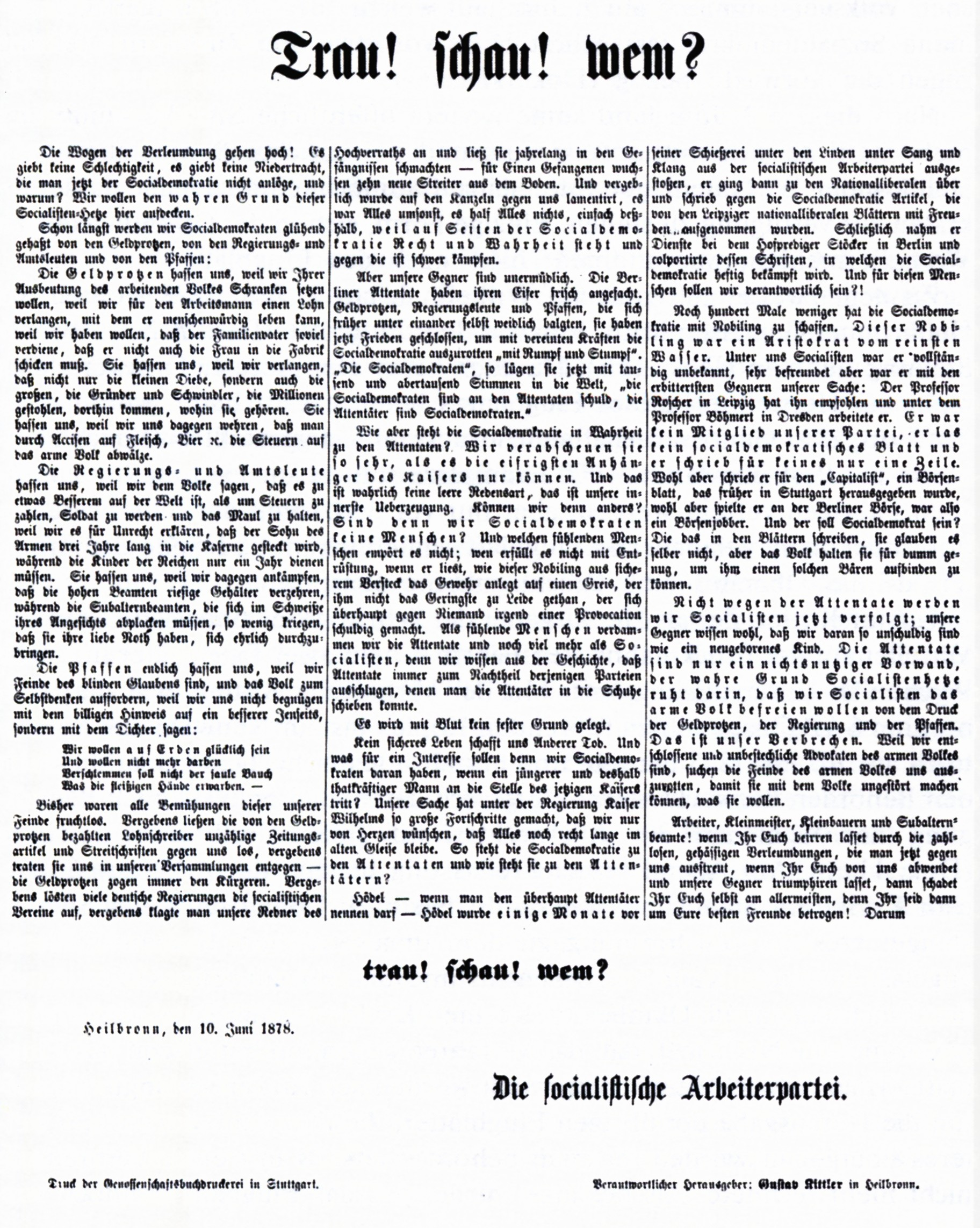 Flugblatt